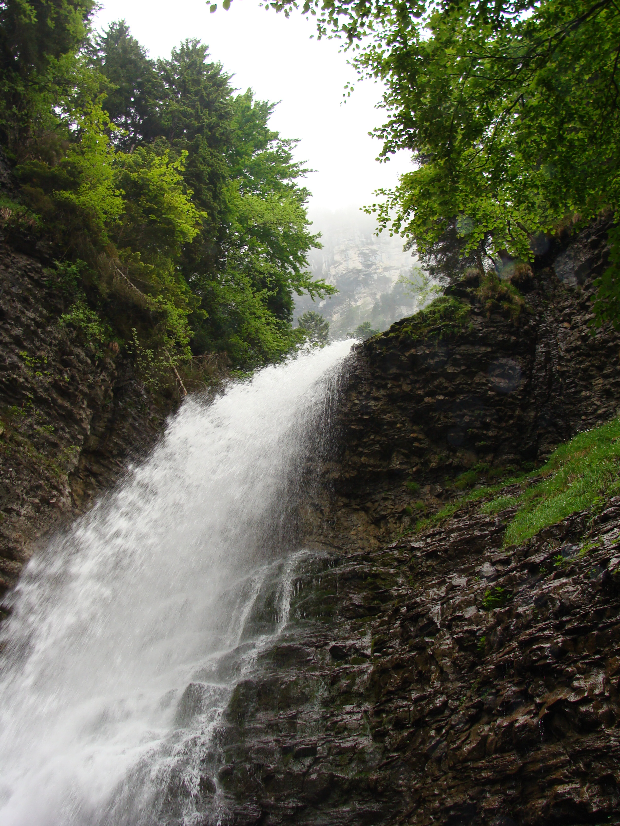 Cascade isolée, cirque de St Même